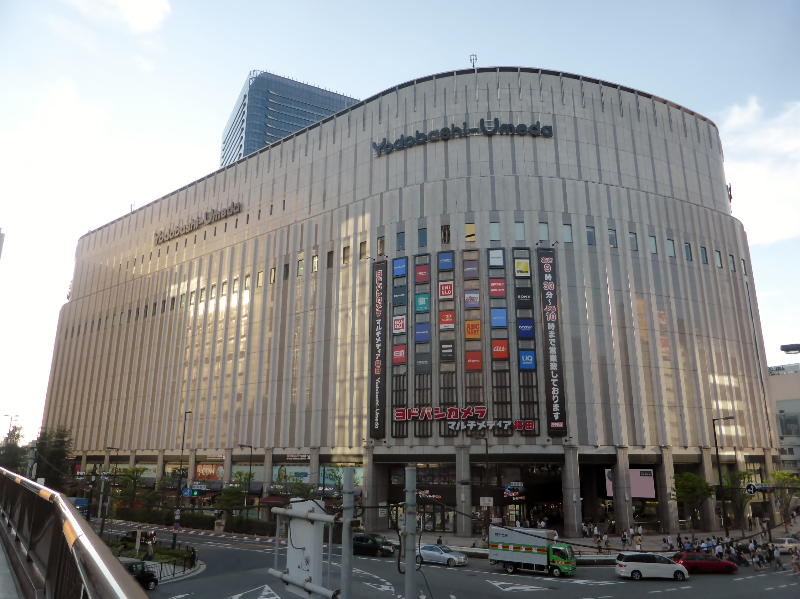 ヨドバシ梅田を撮影